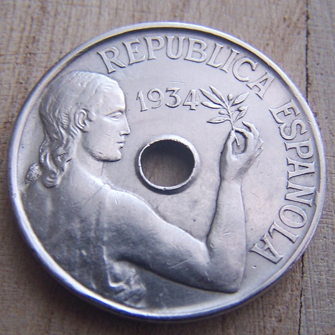 25 céntimos 1934 (anverso)